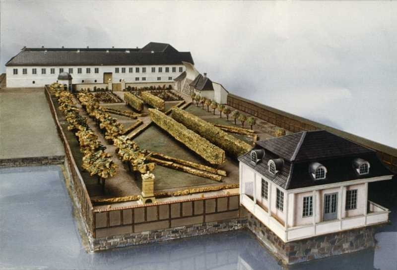 Modell av Paléet og Paléhaven